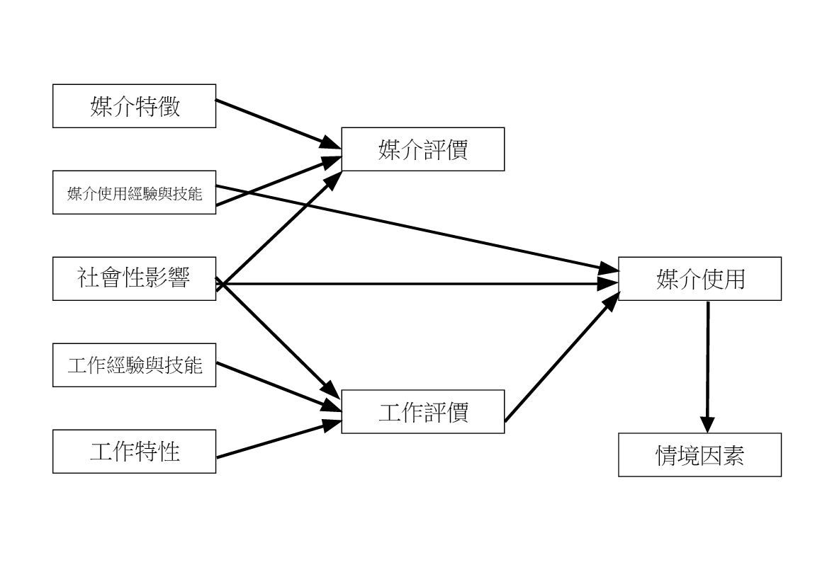 中文（台灣）: 各自影響之情境因素